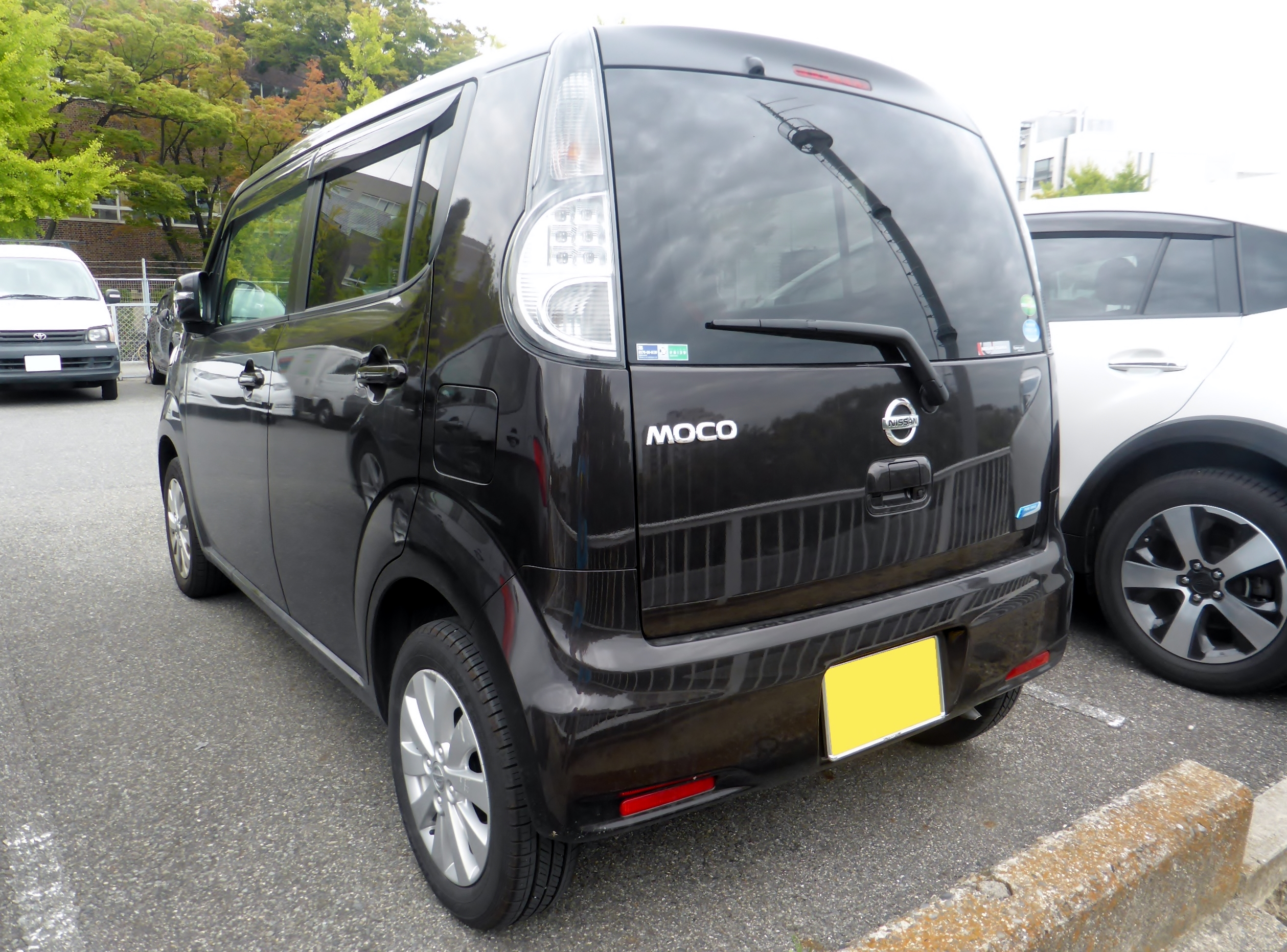 SA2型日産・モコドルチェXをリアから撮影。